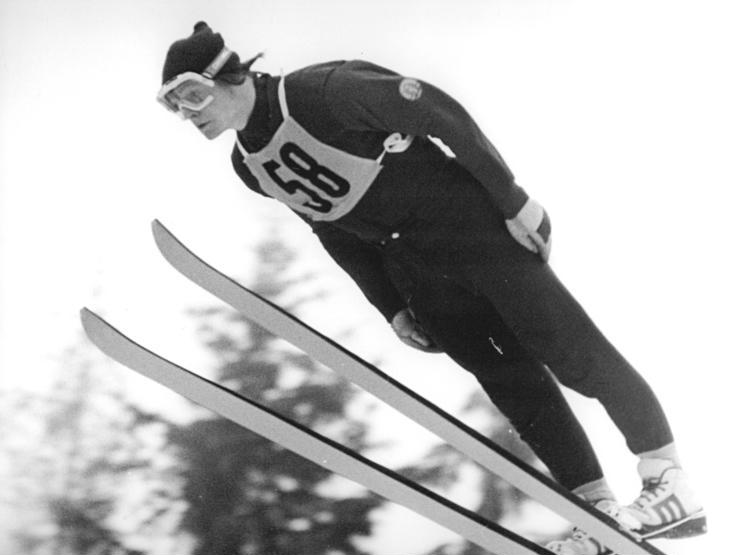 ADN-ZB Demme-26.12.1973 Suhl: Weihnachtssprunglauf in Oberhof Den Saisonauftakt der DDR-Spezialspringer gewann am 26.12.1973 vor 4000 Zuschauern auf der Oberhofer Thüringer-Schanze Bernd Eckstein vom SC Motor Zella-Mehlis mit 232,7 Punkten und 77,5 und 81 Metern.